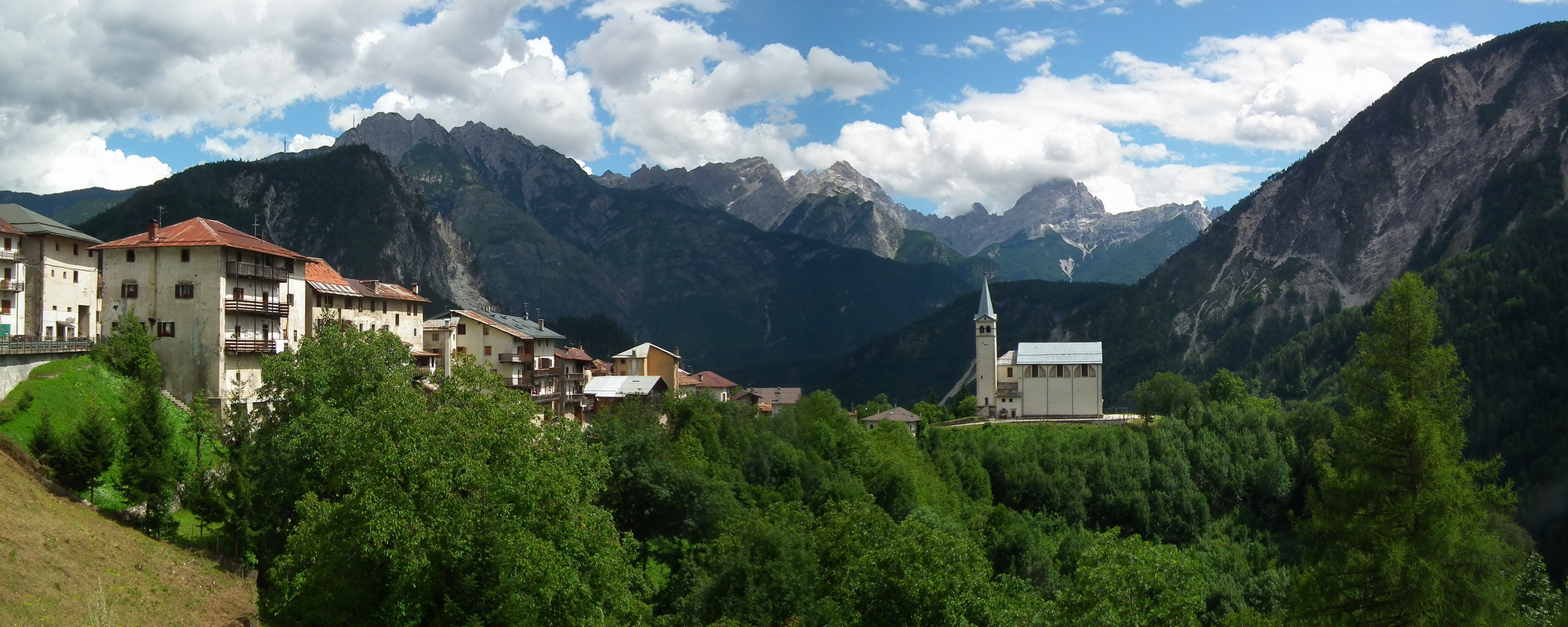 Valle di Cadore, Veneto, Italy